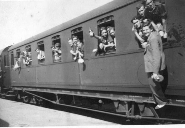 שיירת עולי אף-על-פי יוצאת ברכבת מיוחדת מווינה.